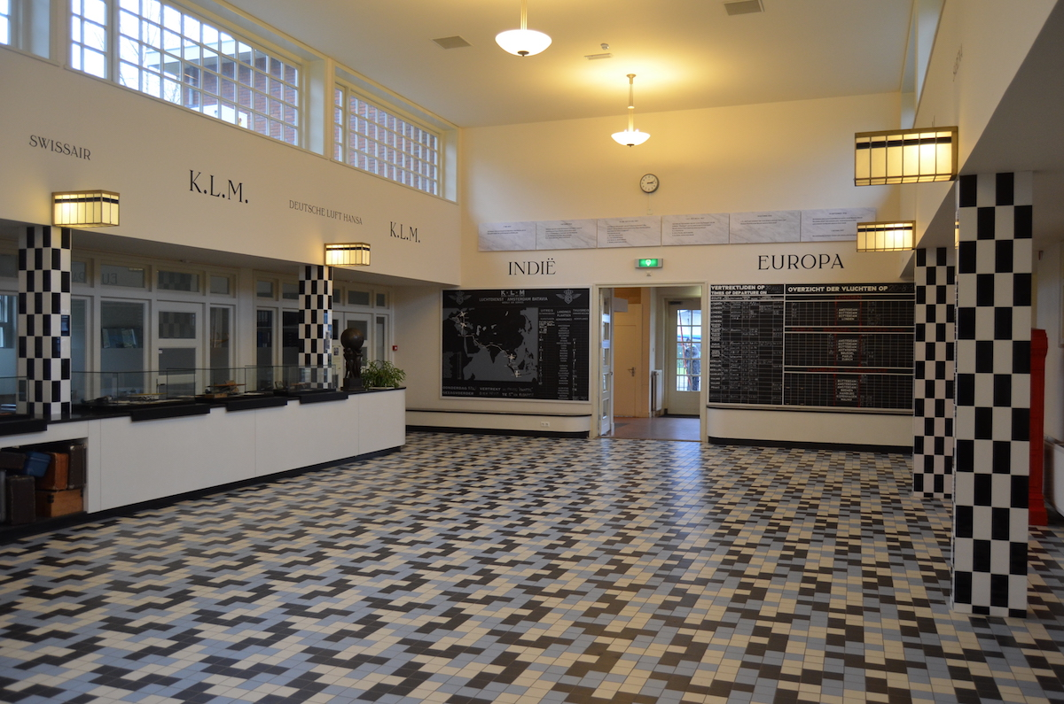 Aviodrome Lelystad. Luchthavengebouw ontvangsthal. Foto: Erik Swierstra.